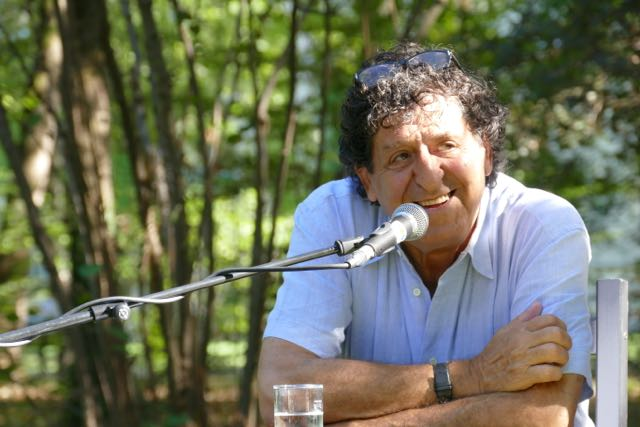 Robert Schindel stellte auf dem Erlanger Poetenfest 2015 seinen Lyrikband "Scharlachnatter" vor